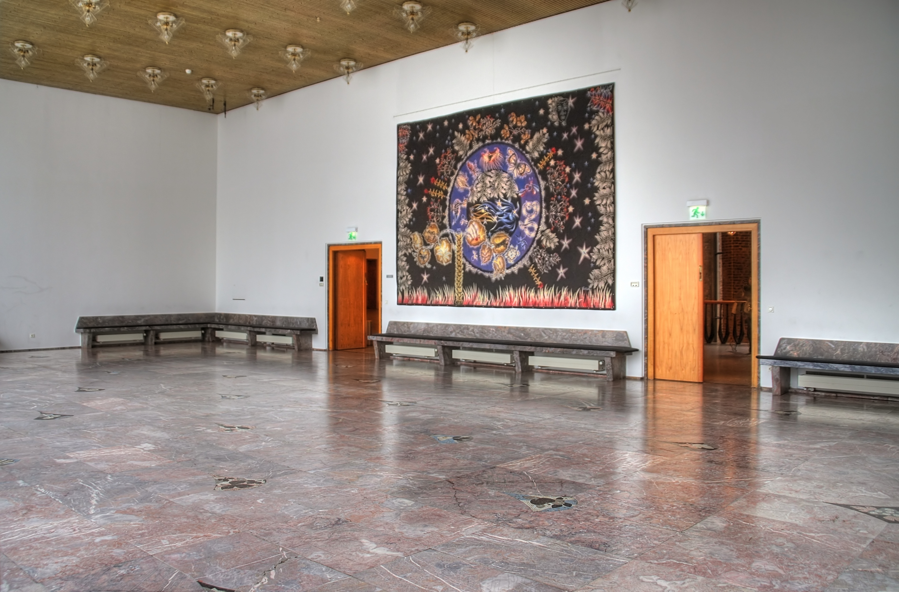 Gürzenich, Köln: Isabellensaal im Obergeschoss.